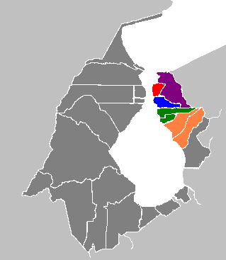 Parroquias del Cantón Altagracia (Zulia) 1883 - 1904.